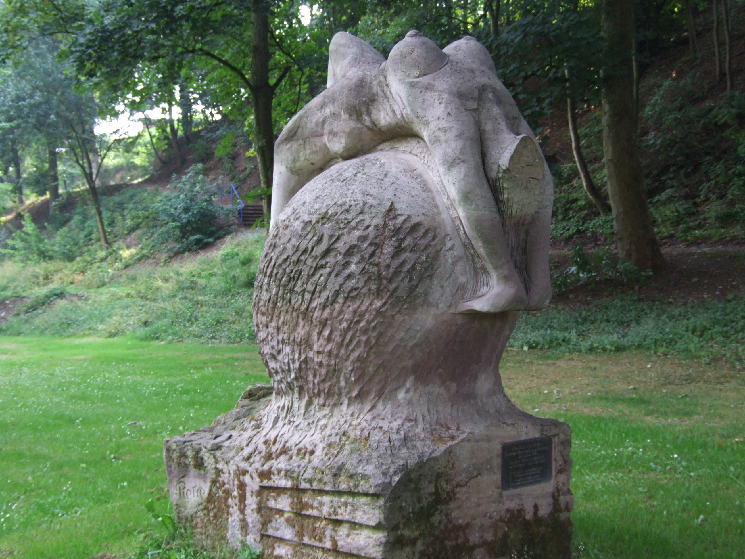 Es ist ein regionales Werk,etwa vor 12 Jahren erschaffen als Freundschaftsgeschenk von der französischen Stadt La Montange.Städtepartnerschaft.